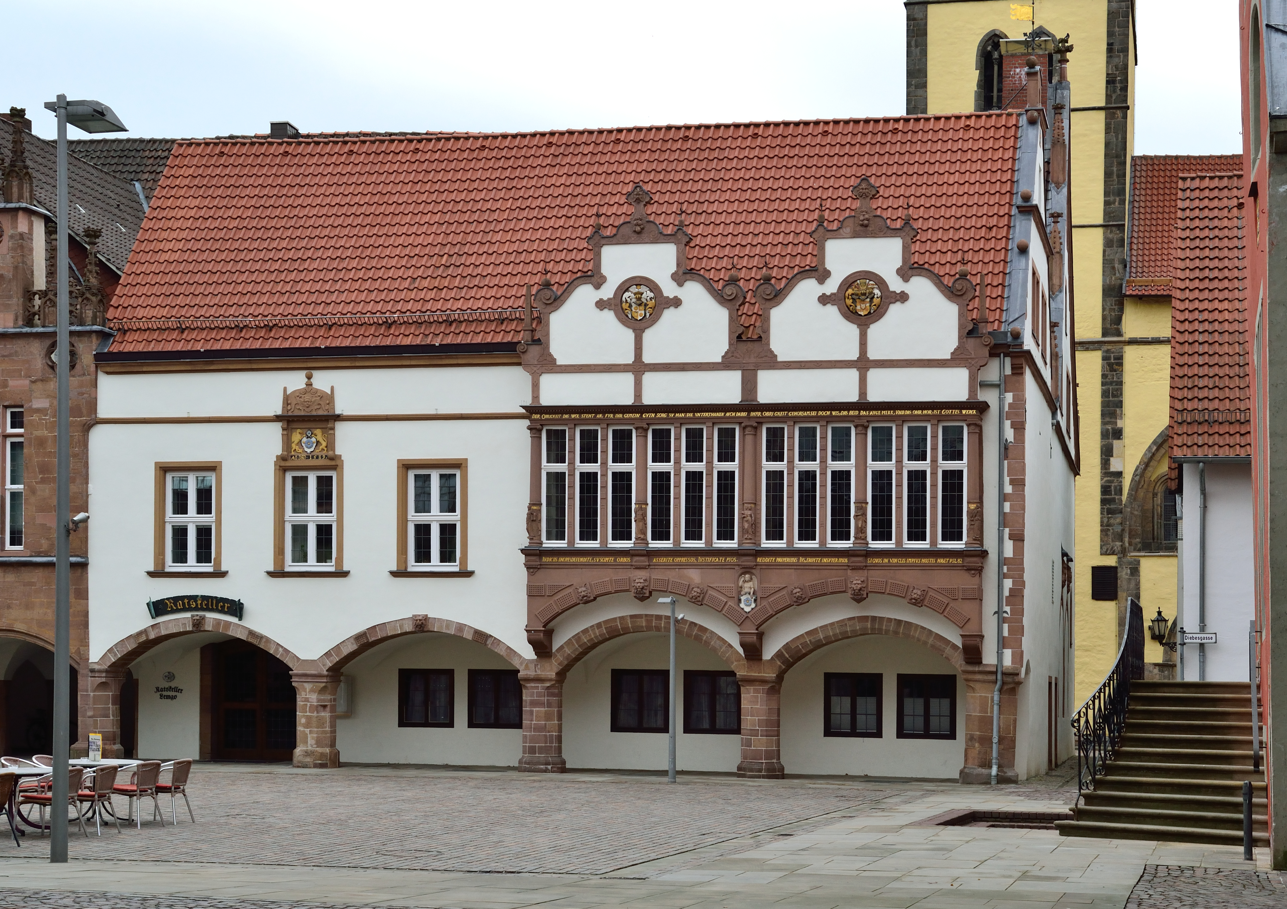 This is a photograph of an architectural monument.It is on the list of cultural monuments of Lemgo Rathaus Lemgo, Ratsstubenerker